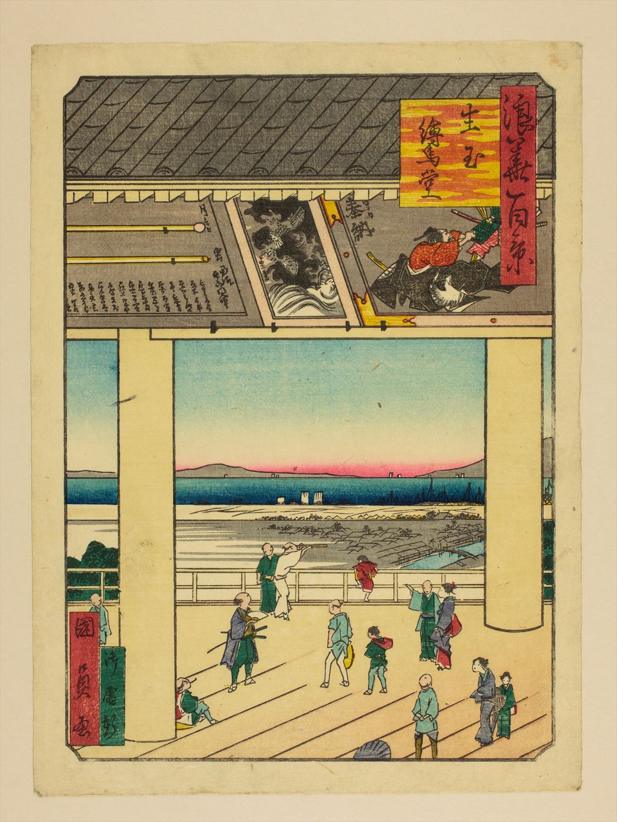 1800年代。歌川國員/画 。浪花百景 102枚のうちの1枚。大阪市立中央図書館蔵。